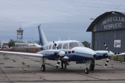 Piper Navajo en plataforma del Aeropuerto "Gral. Mosconi"/Tartagal